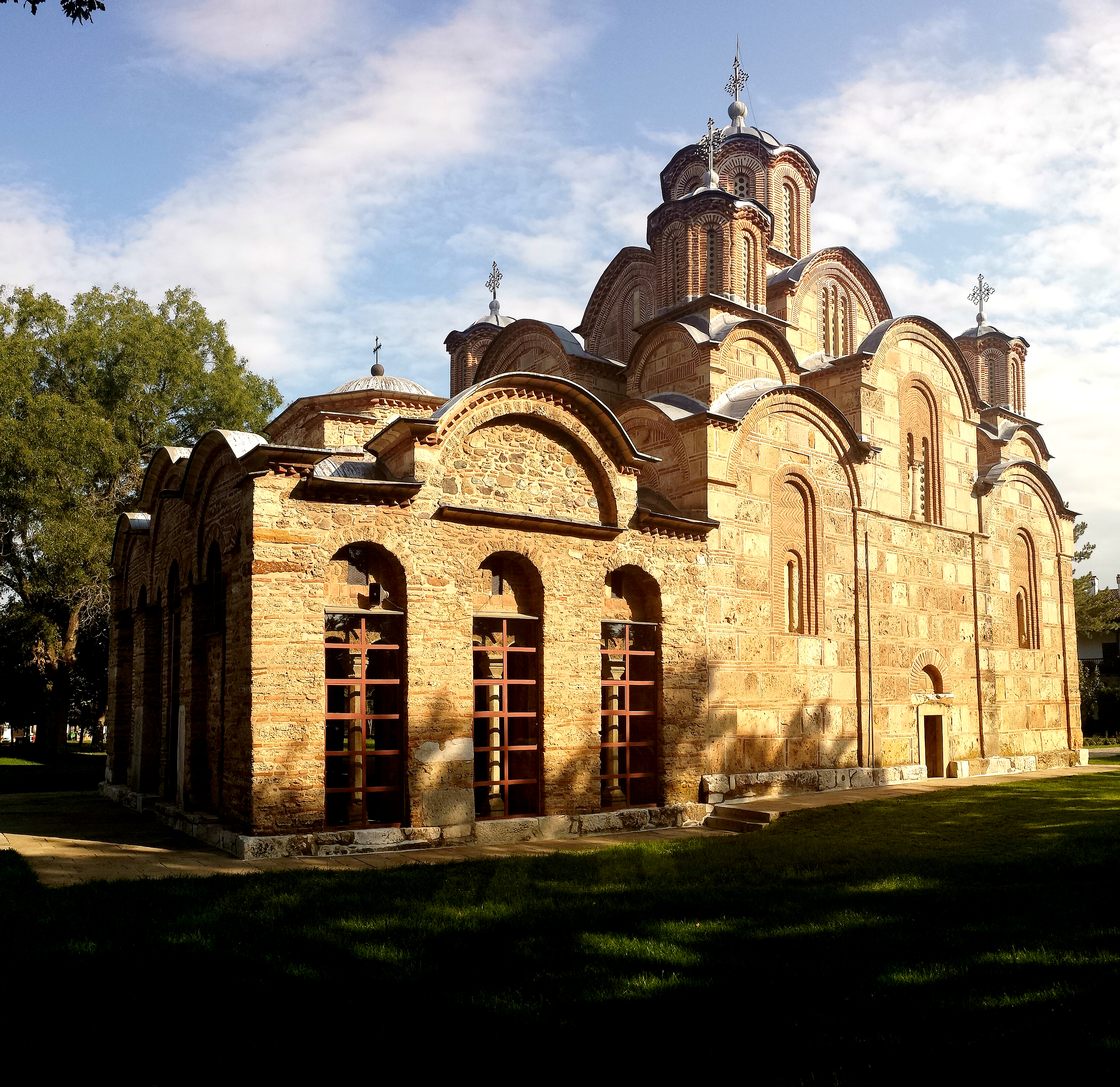 Manastiri i Graçanicës